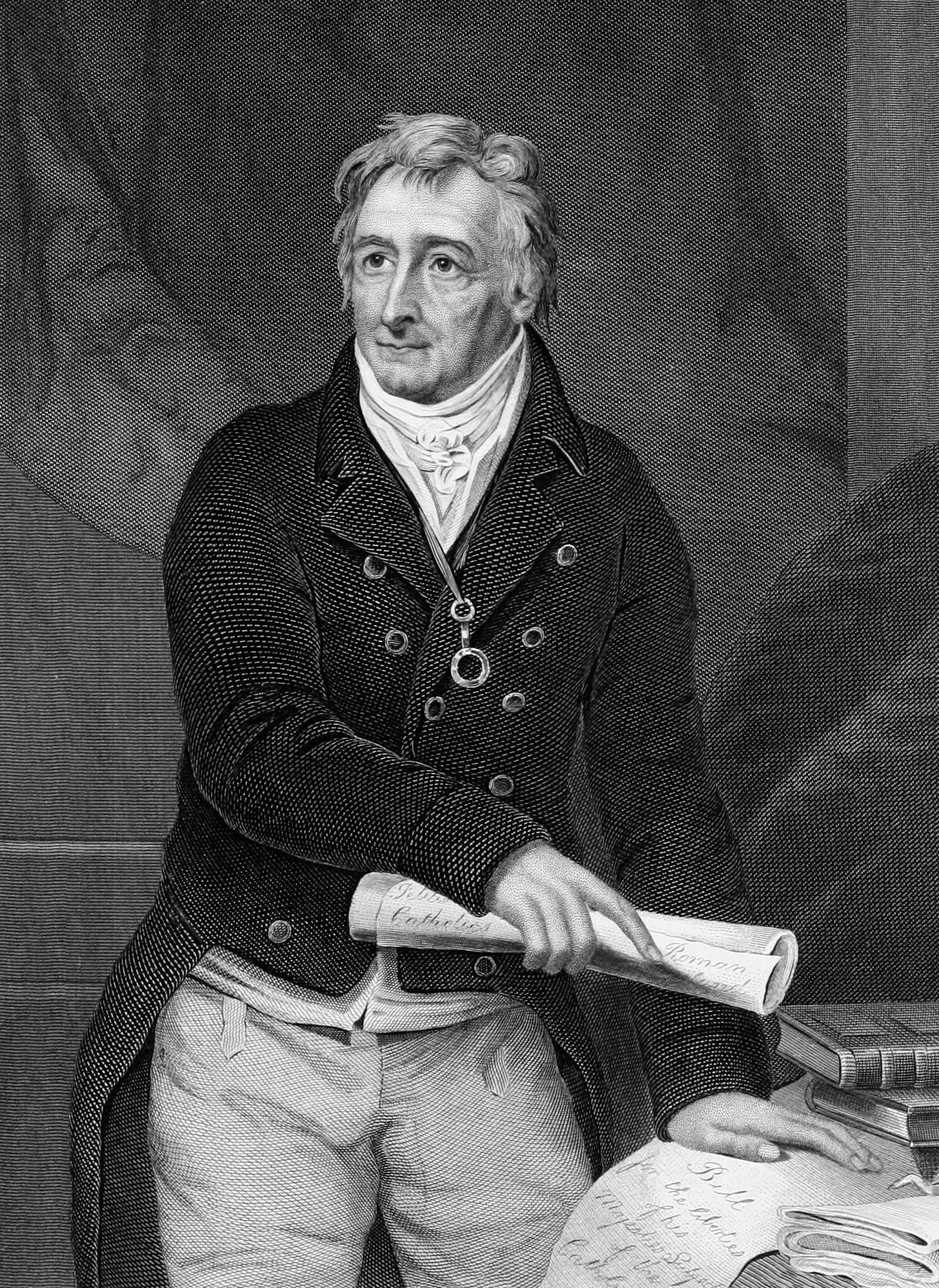 Henry Grattan